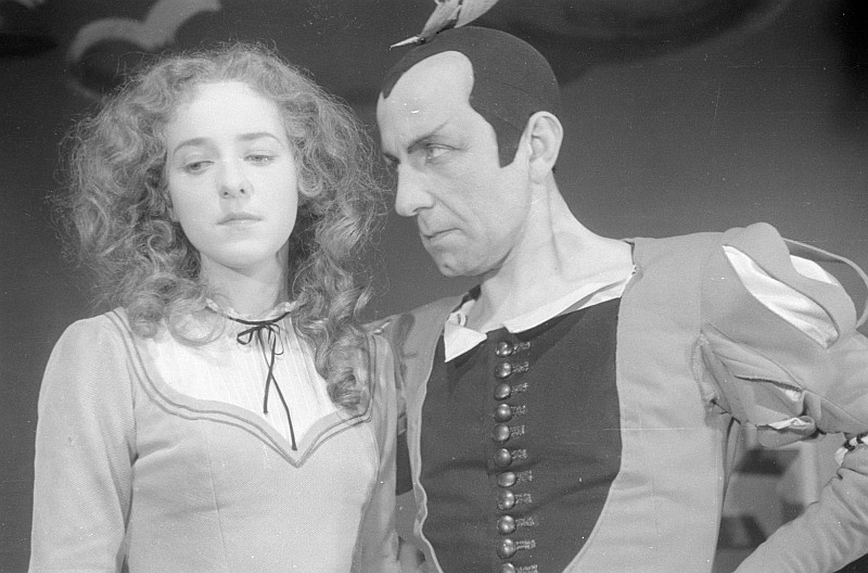 Original image description from the Deutsche Fotothek Szenenbilder "Urfaust" mit Otto Eduard Hasse als Mephisto